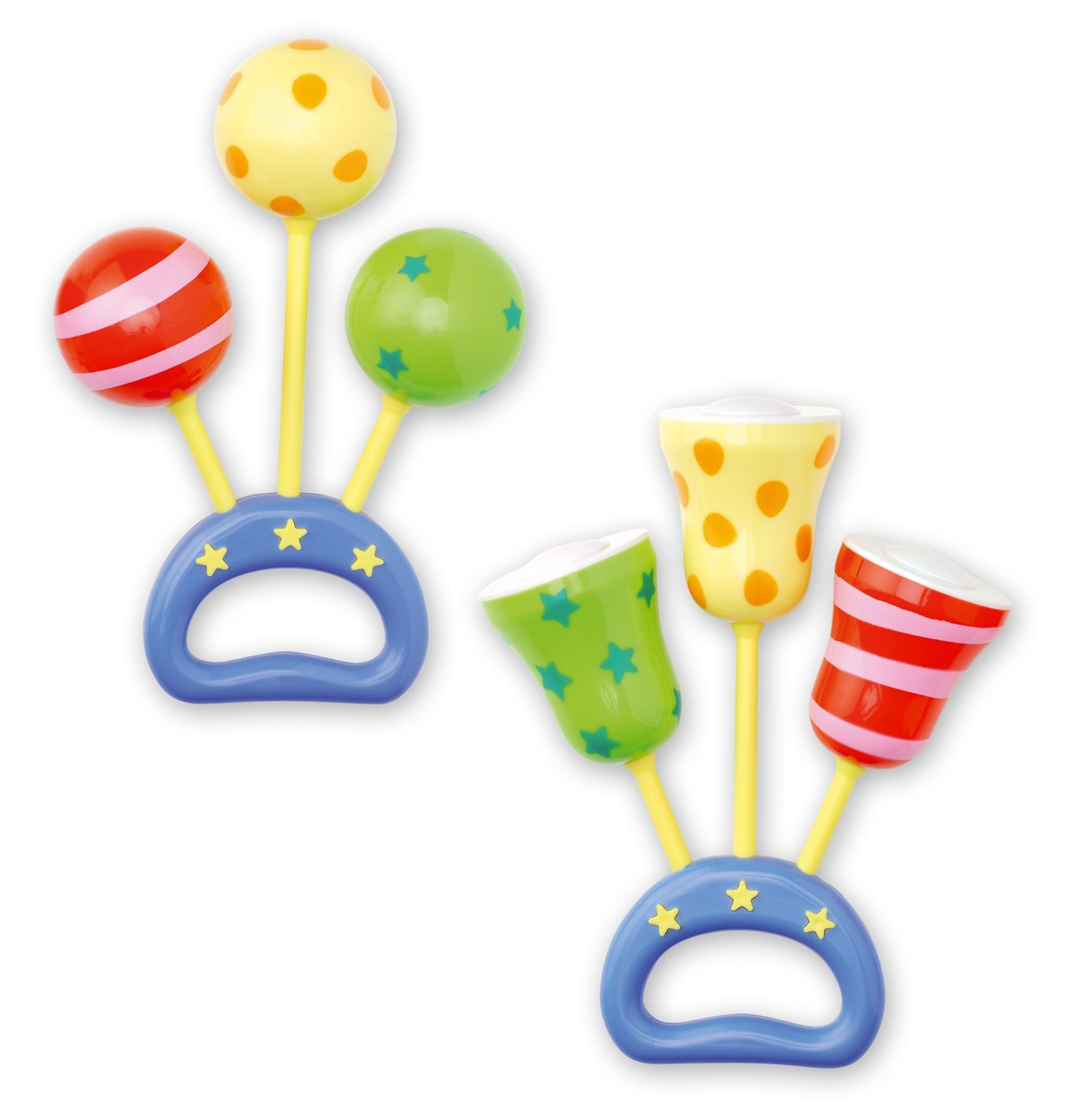 sonajero